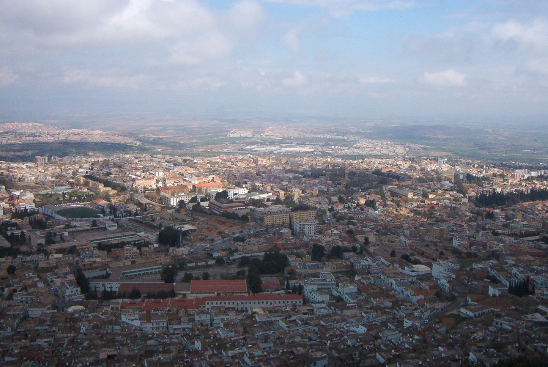 vue de Tlemcen depuis le plateau Lalla Setti